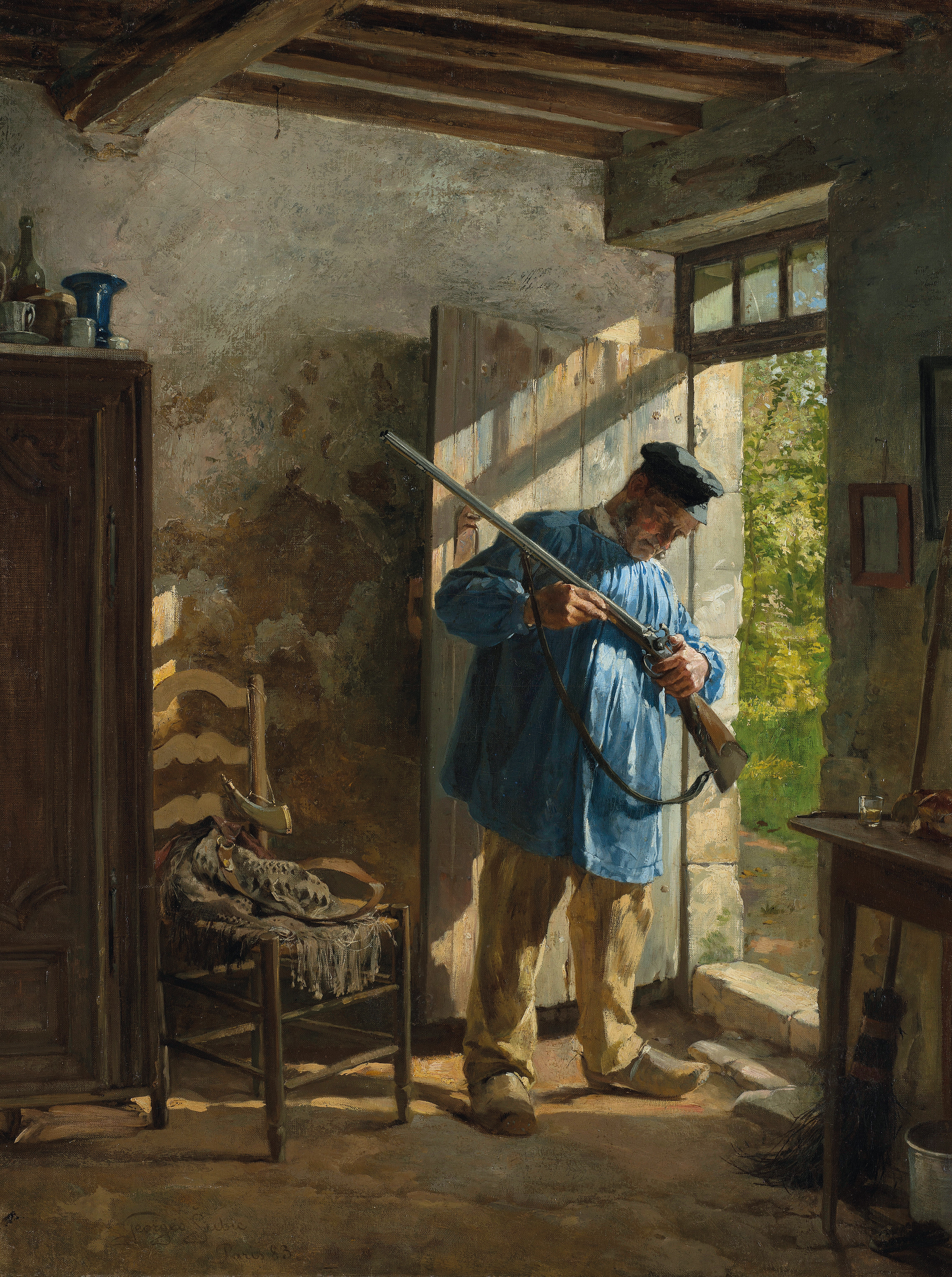 Slika Pred lovom prikazuje lovca,ki pred s soncem obsijanimi vrati pregleduje puško. Slika kaže na slikarjevo natančno opazovanje barvnih odbleskov,igro sonca in sence,trepetanje ozračja v barvnih tonih itd. Šubic je sliko l. 1883 kot prvi Slovenec razstavil v pariškem Salonu in z njo dosegel lepo priznanje.